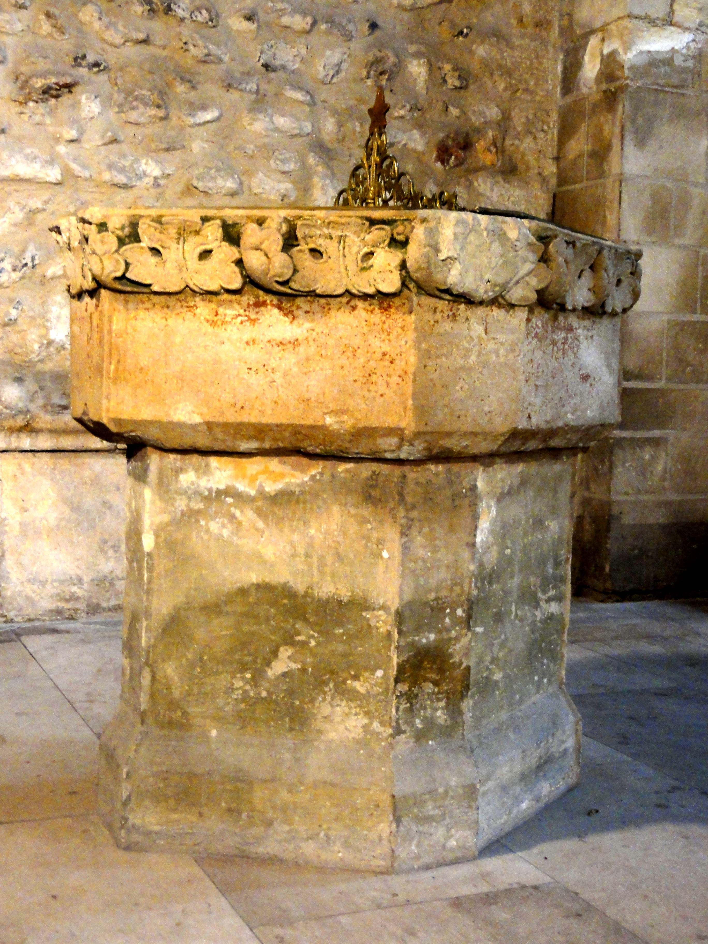 Fonts baptismaux.